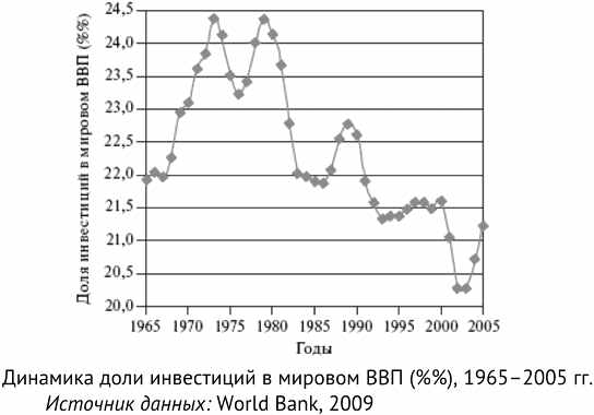 Template:"Доля инвестиций в мировом ВВП 1965-2010"